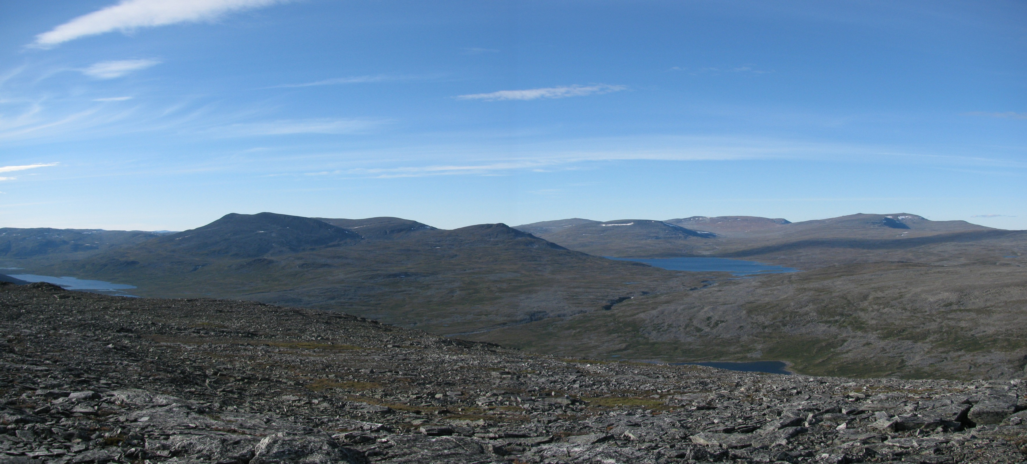 vasemmalta Kovddoskaisi (1 242 m), Pihtsosjunni (1 083 m), Kiedditsohkka (1 271 m), Etu-Halti (1 200 m), Halti (1 365 m / 1 324 m) ja Ridnitsohkka (1 317 m). Kuva on otettu Meekonvaaran (1 019 m) laelta.